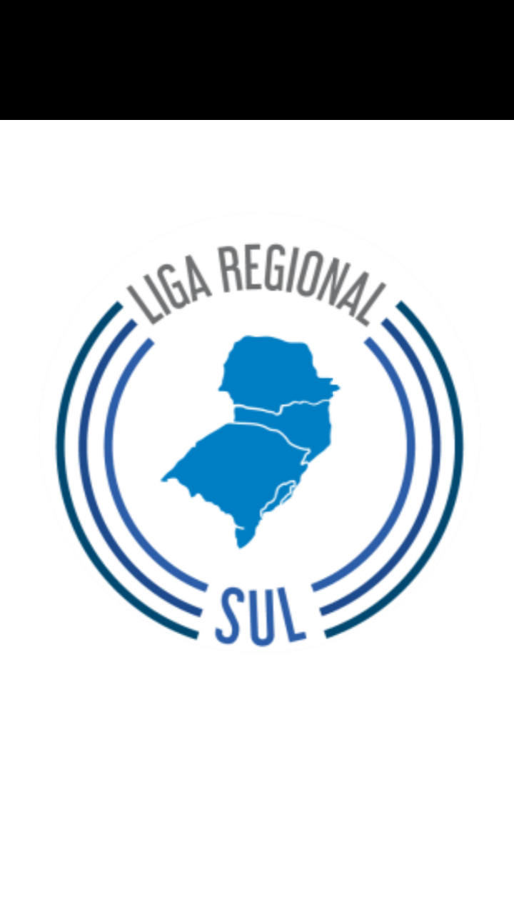 Português do Brasil: Liga Regional Sul de Futsal